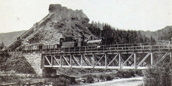 A gyimesbükki magyar-román határ. Jobbról a hegy tetején vannak a Rákoczi-vár romjai és a vasúti híd a határon, amelyen Romániából jön át Magyarországra egy gőzös vonat 1940-ben.